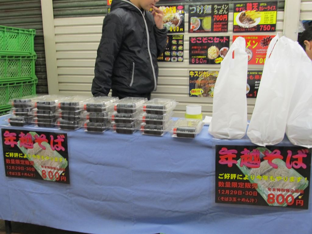 年越蕎麦（としこしそば）の販売